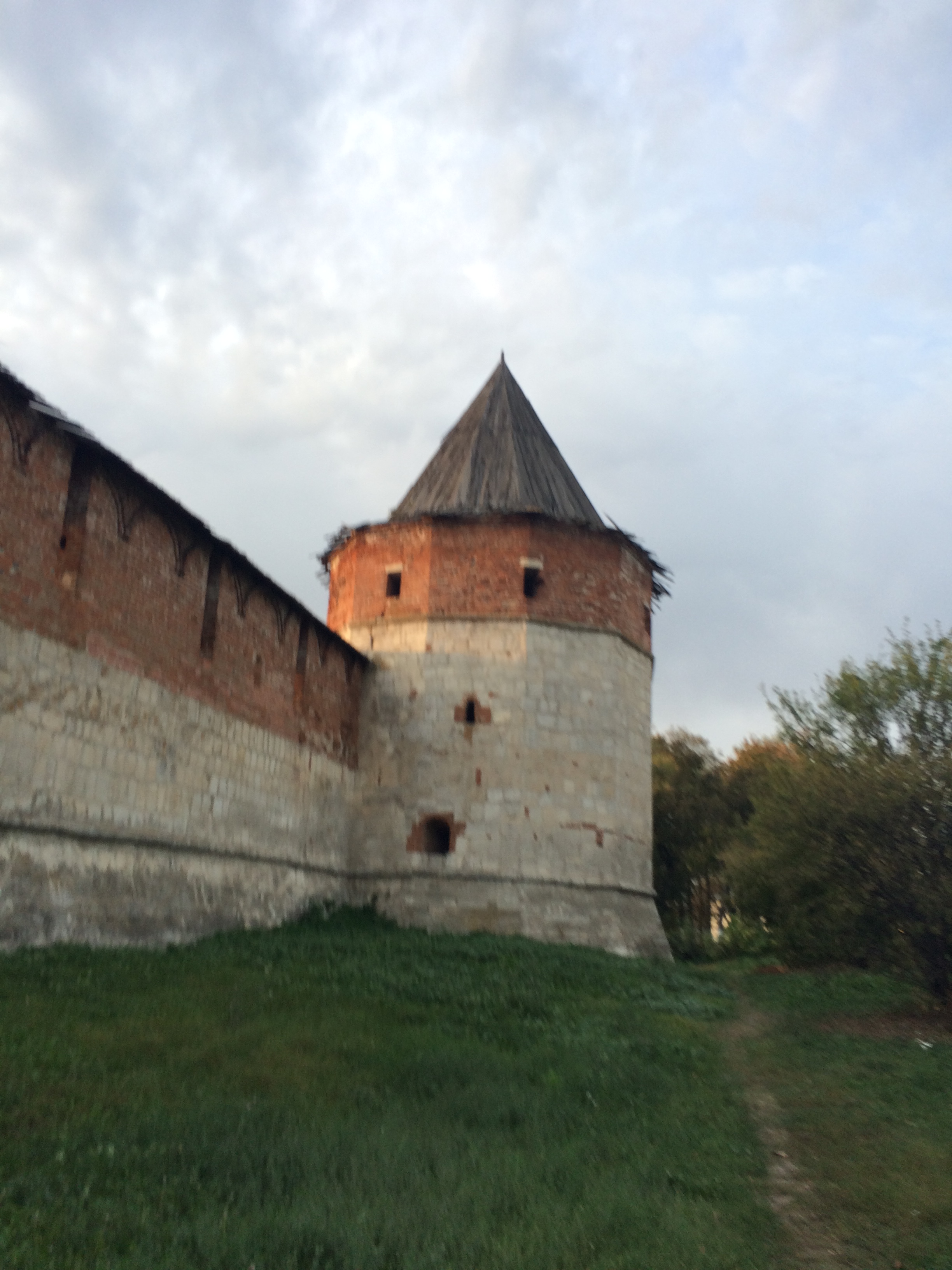 Башня северо-восточная (Казенная): улица Музейная, Зарайск, Зарайский район, Московская область